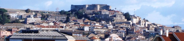 Vibo Valentia - Panorama (VV)